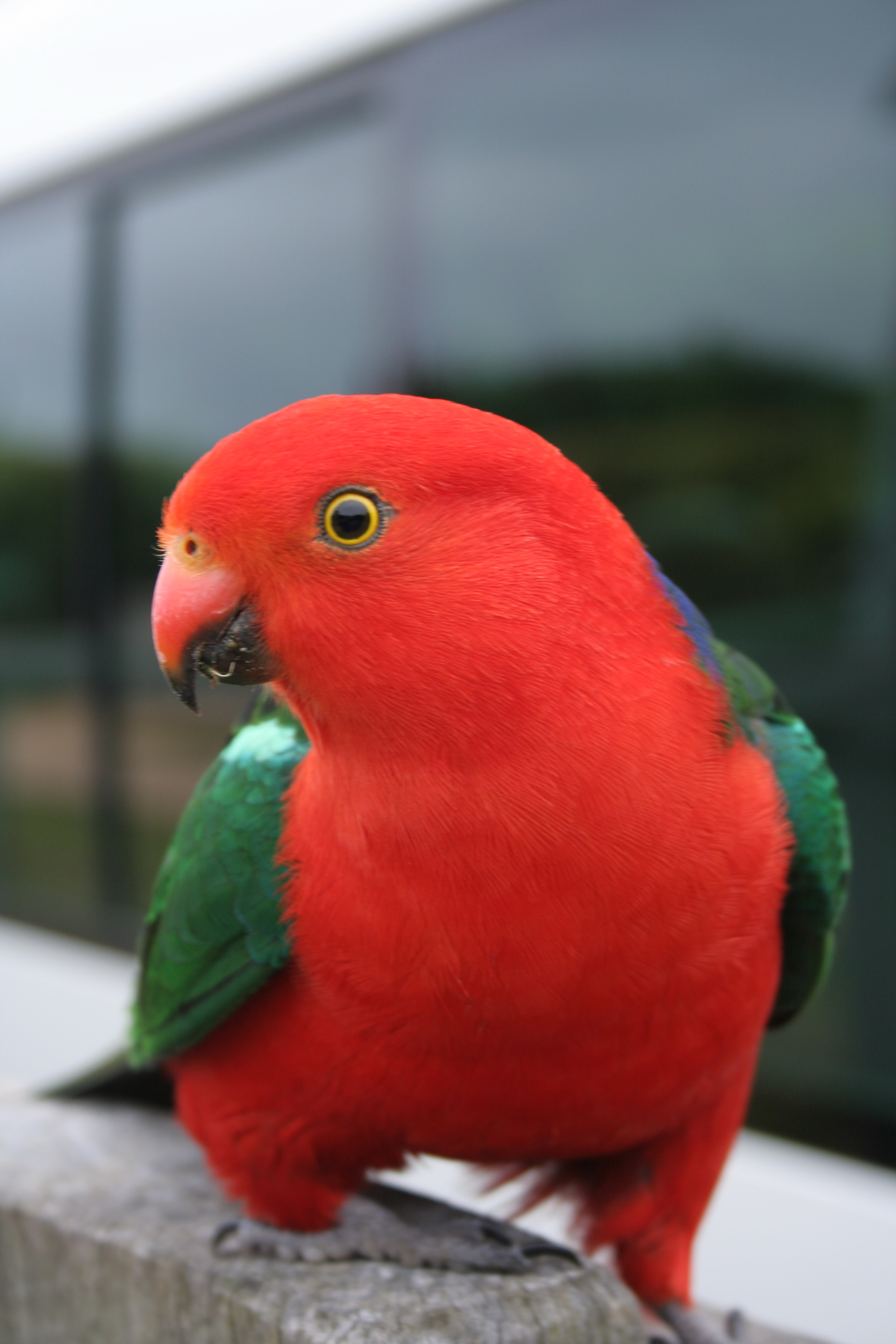 Australasian King-Parrot, Alisterus scapularis, male